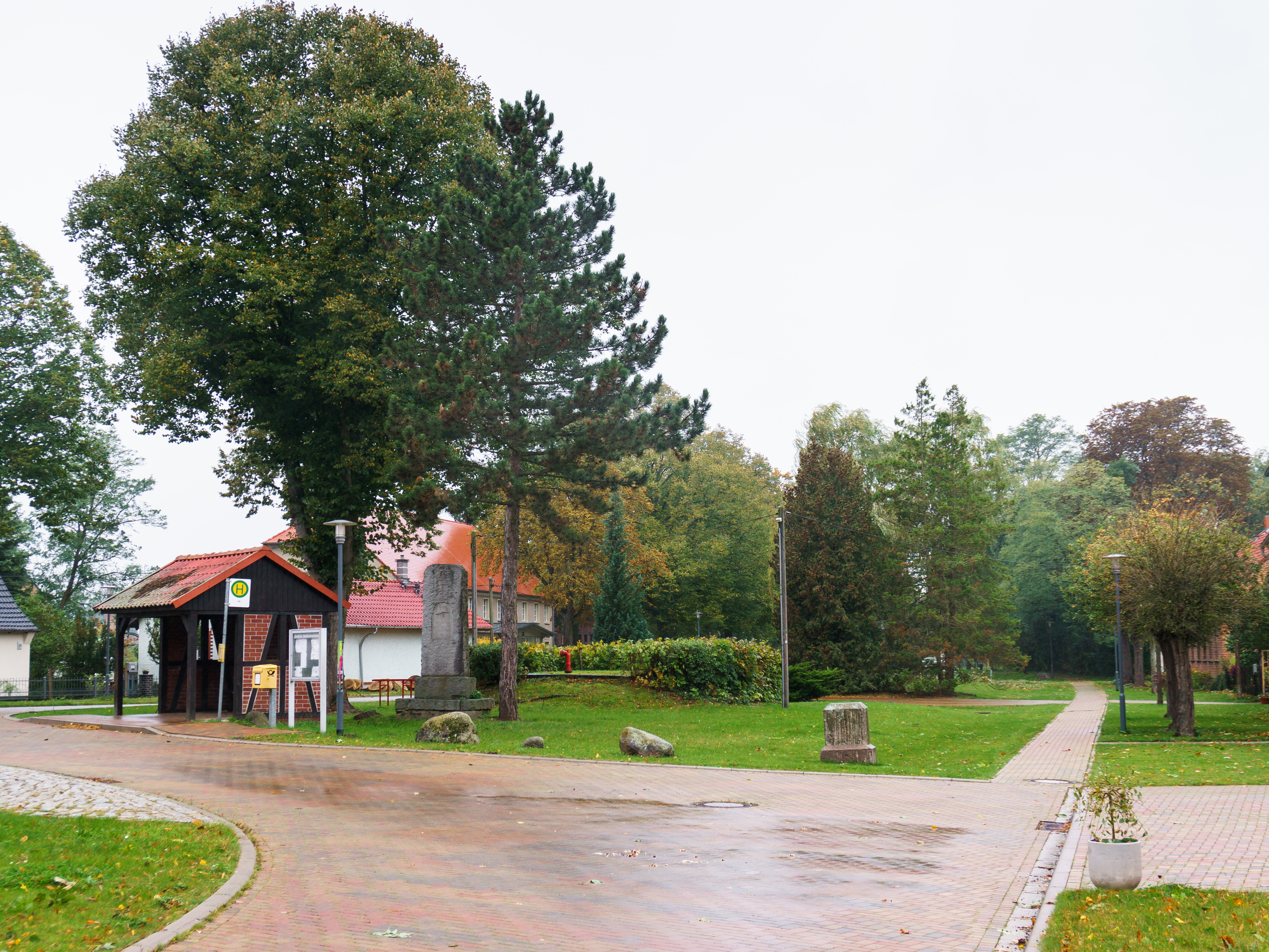 Preußischer Halbmeilenstein, neben der Bushaltestelle in Wusterhausen/Dosse OT Barsikow.